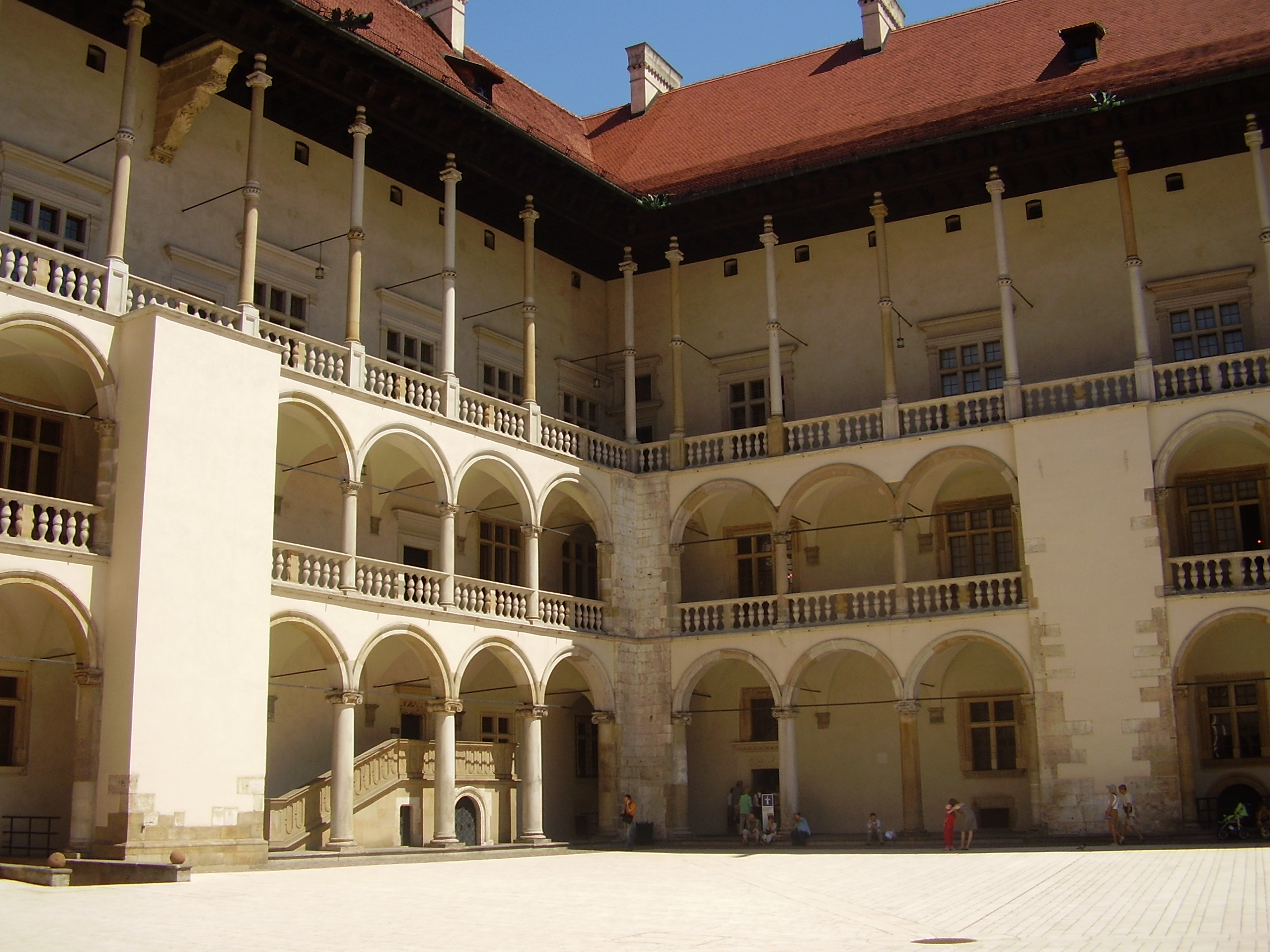 Kraków, Poland